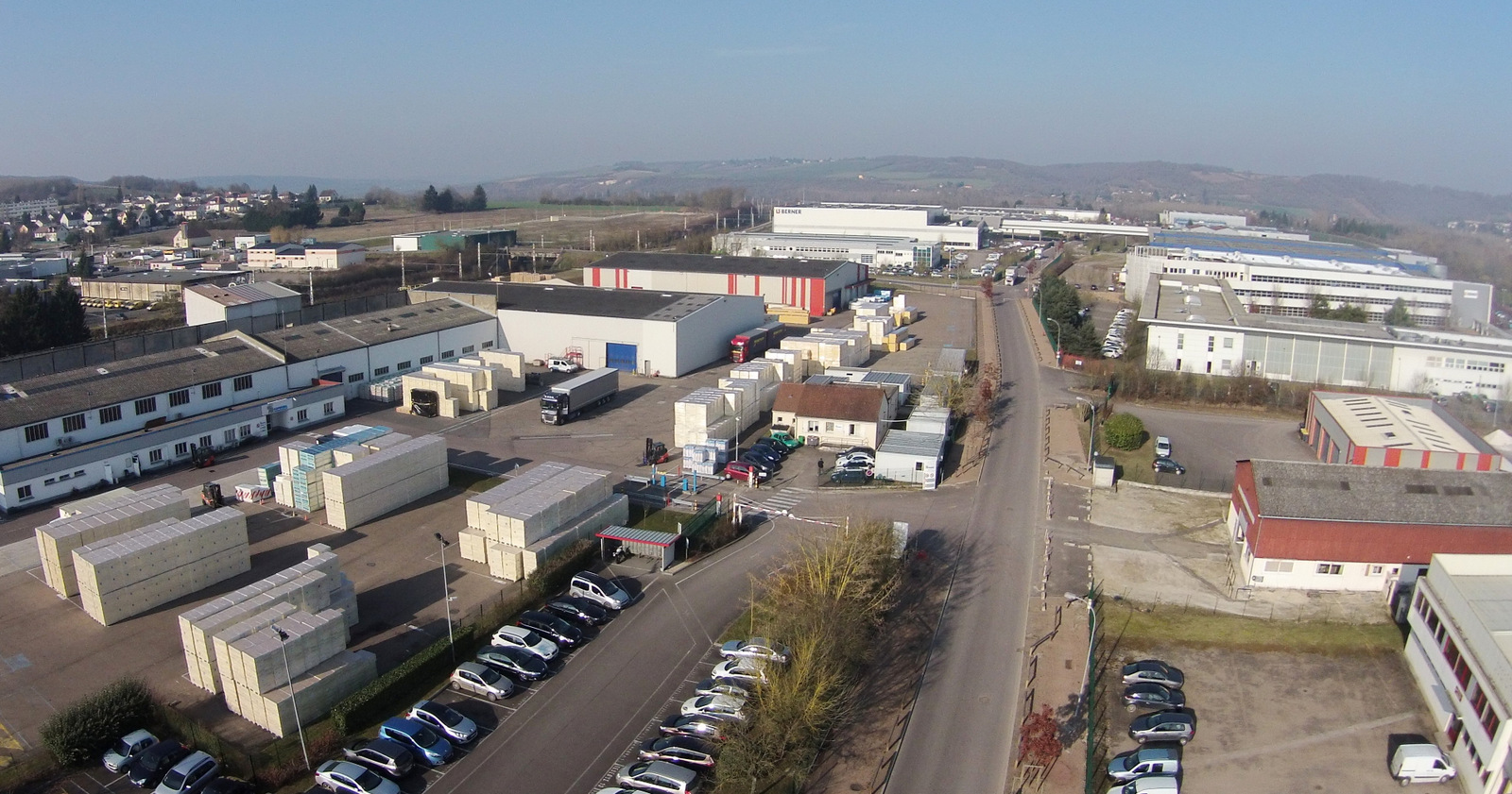 BERNER, SOPREMA, AUTOMOTIVE LIGHTING, parmi les principales entreprises de St Julien du Sault